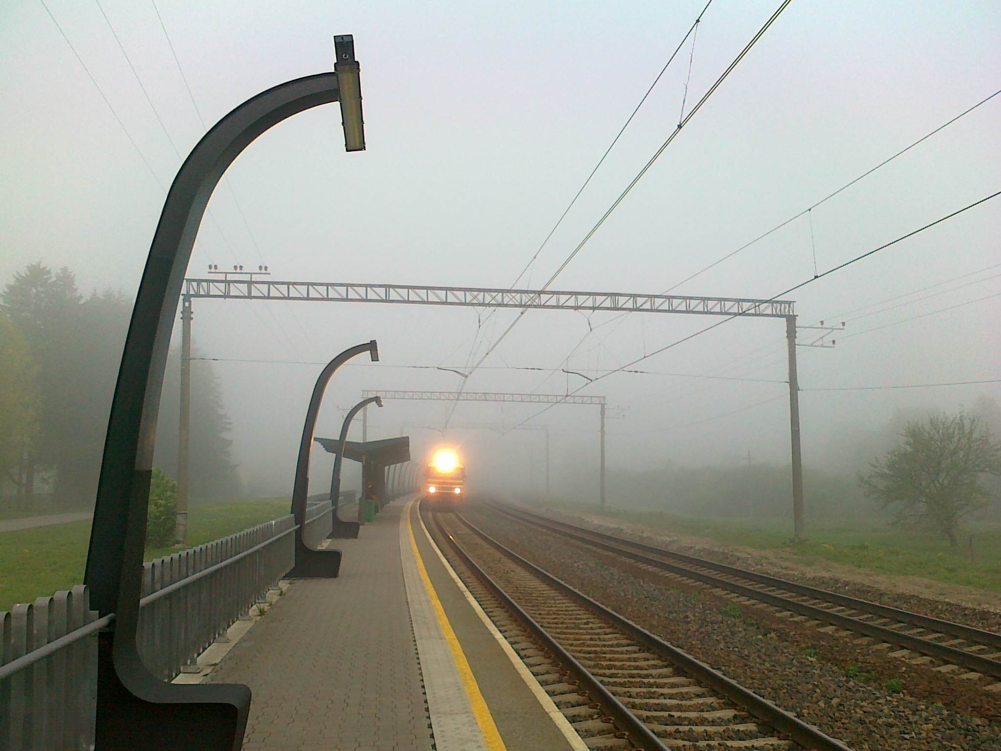 Aruküla raudteepeatus, rongi saabumine udusel hommikul.